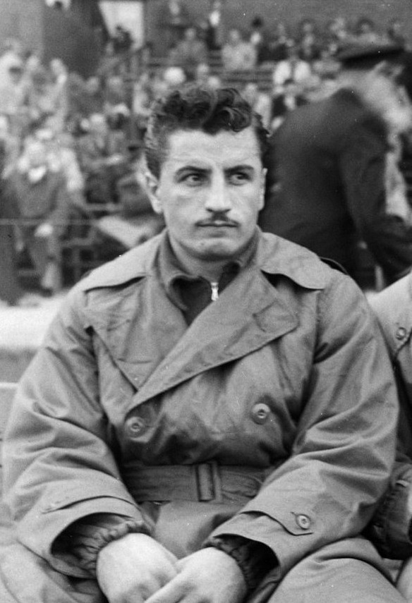 Fifa Elftal, Beara (Joegoslavië). Betreft demonstratiewedstrijd van Fifa-elftal tegen CF Barcelona in Olympisch stadion op 30 september 1953